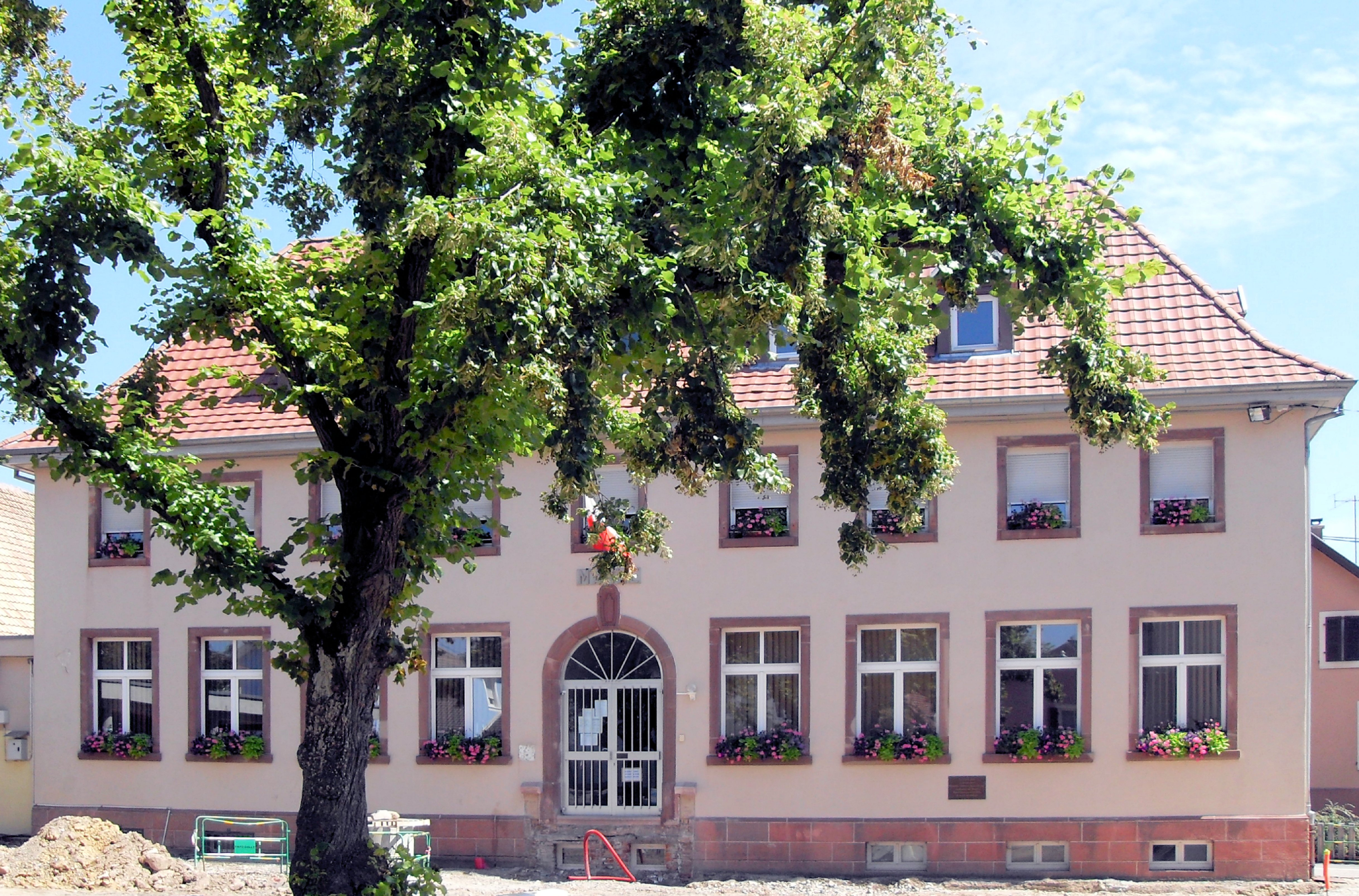 La mairie d'Aspach-le-Haut